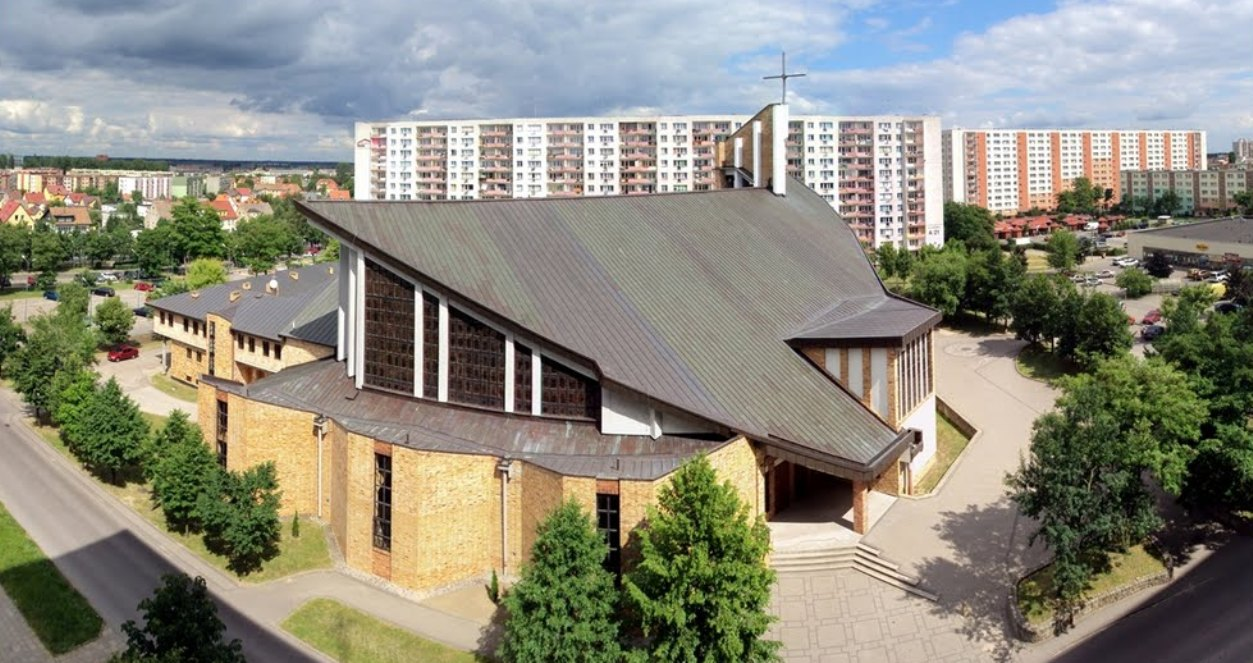 Stargard. Kościół parafii Miłosierdzia Bożego